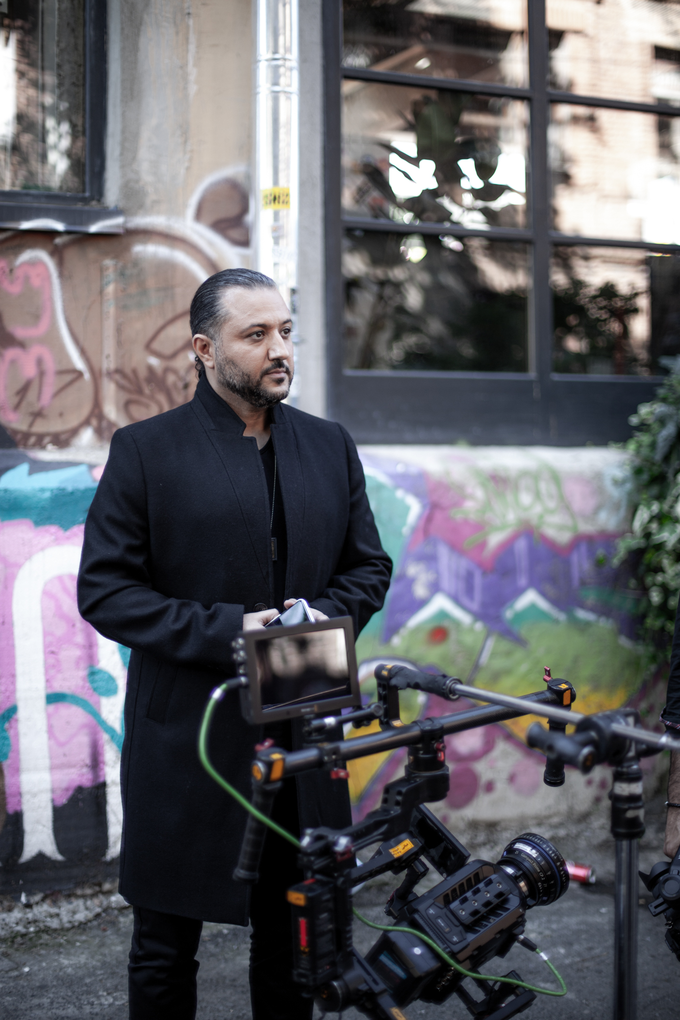 این عکس توسط پوریا افخمی در شهر تفلیس ثبت شده است.